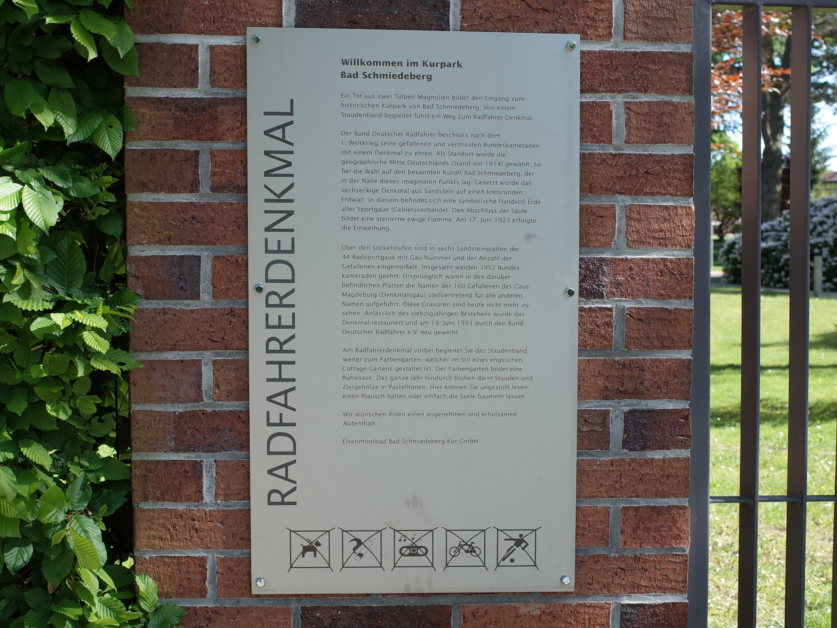 Bad Schmiedeberg, Informationstafel zum Radfahrerdenkmal am Eingang in den Kurpark.